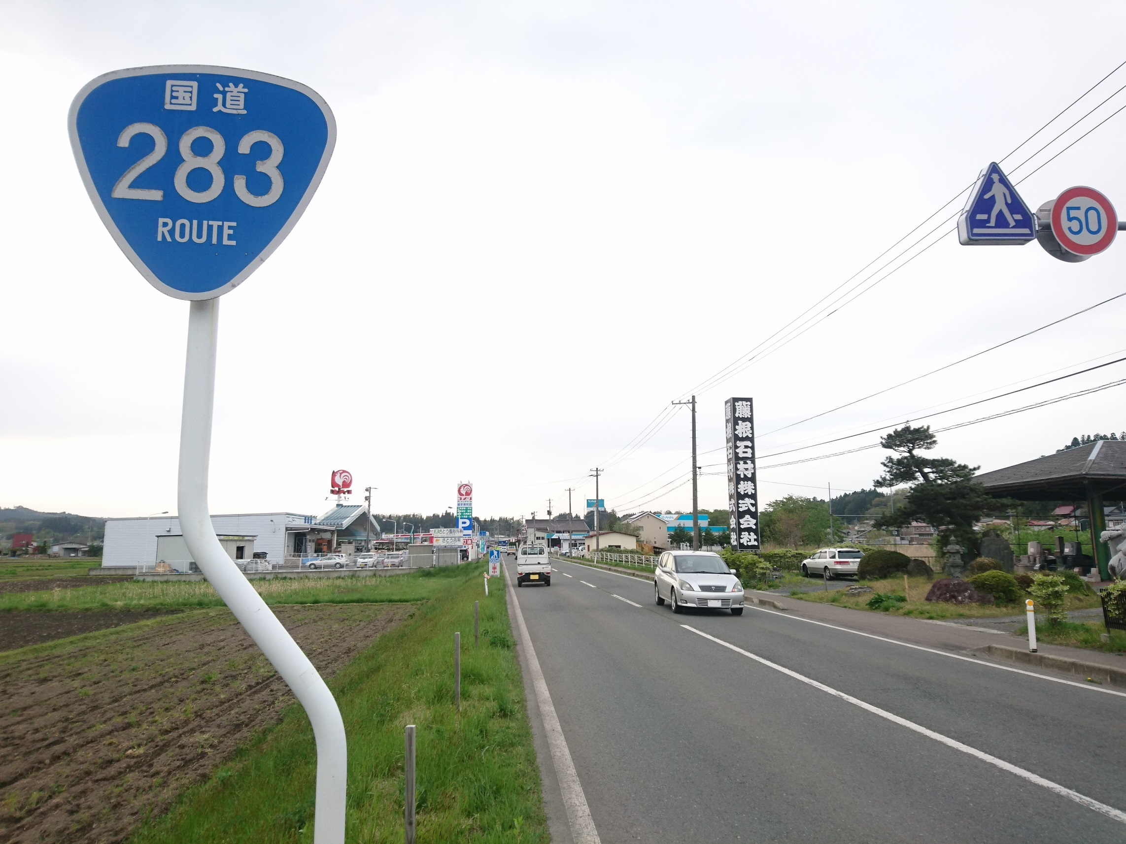 花巻市東和町土沢付近の国道283号。